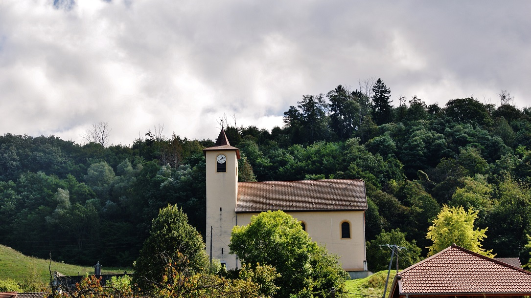 L'église